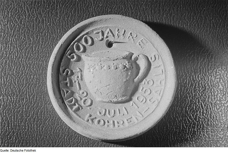 Original image description from the Deutsche FotothekPlakette für die Stadt Kohren-Sahlis (500 Jahre)